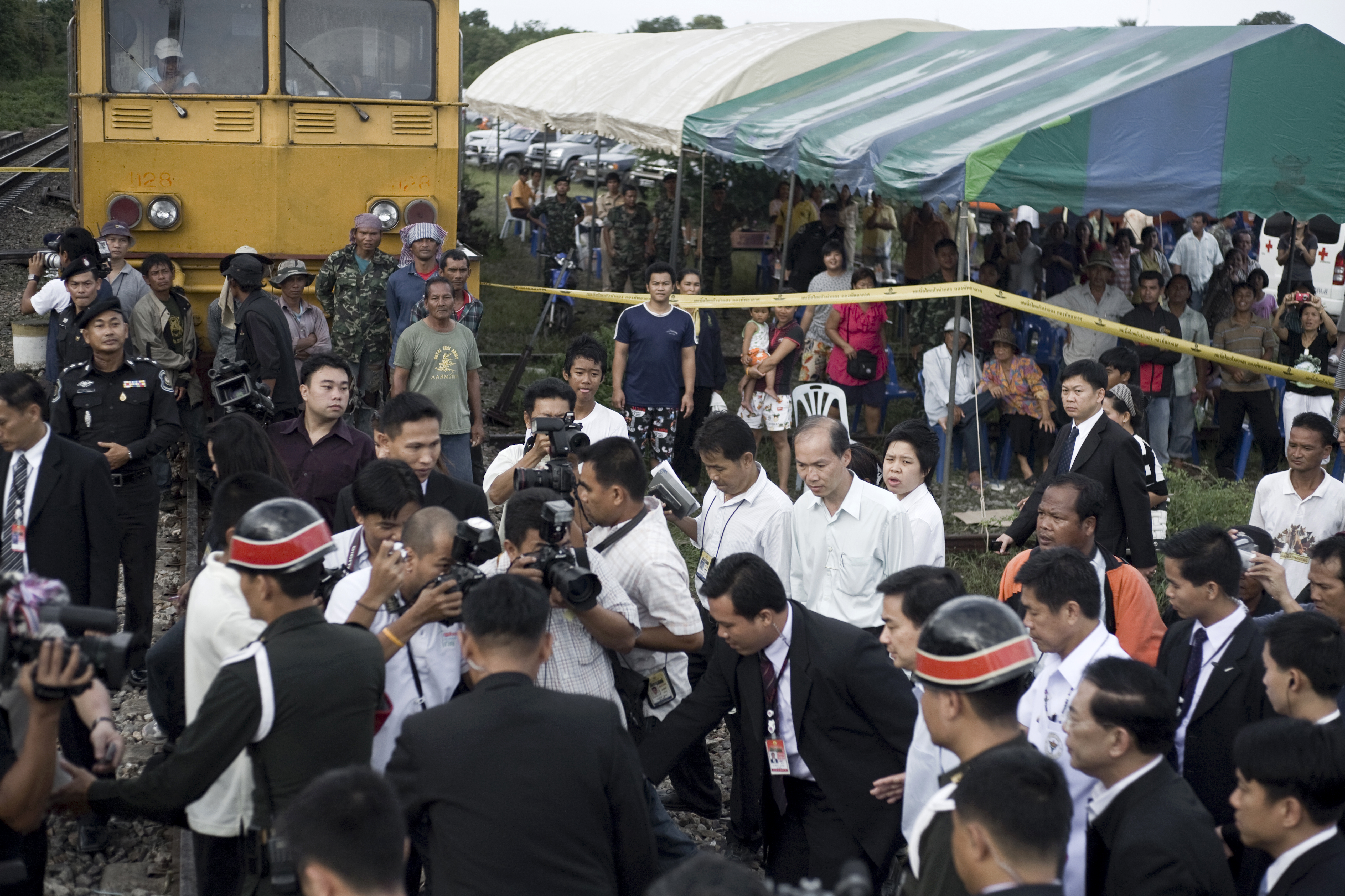 นายกรัฐมนตรีลงพื้นที่ที่เกิดอุบัติเหตุรถไฟตกราง สถานีรถไฟเขาเต่า อ.หัวหิน จังหวัดประจวบคีรีขันธ์ 5ตุลาคม2552 (The Official Site of The Prime Minister of Thailand Photo by พีรพัฒน์ วิมลรังครัตน์)